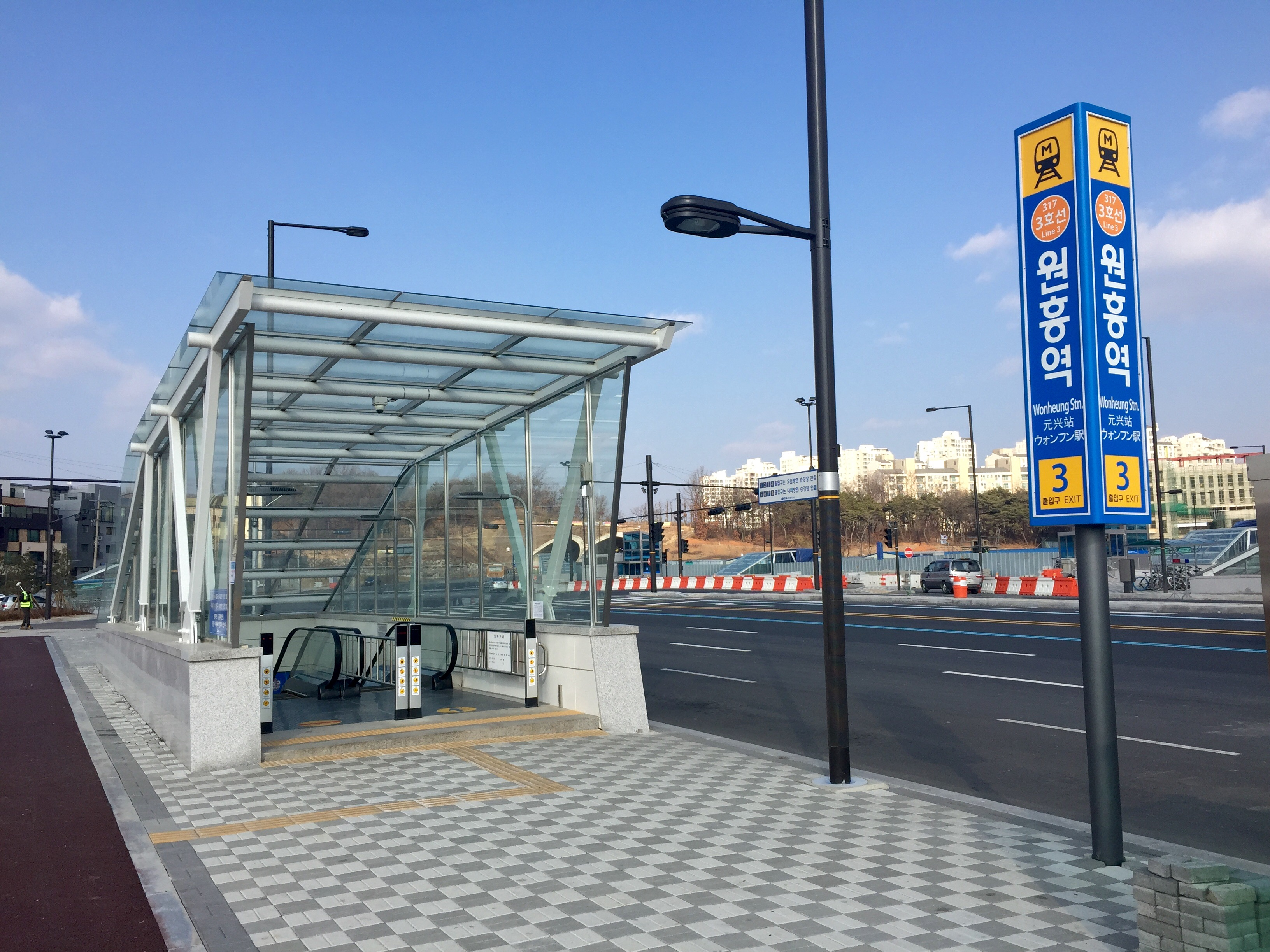 일산선 원흥역 3번 출입구